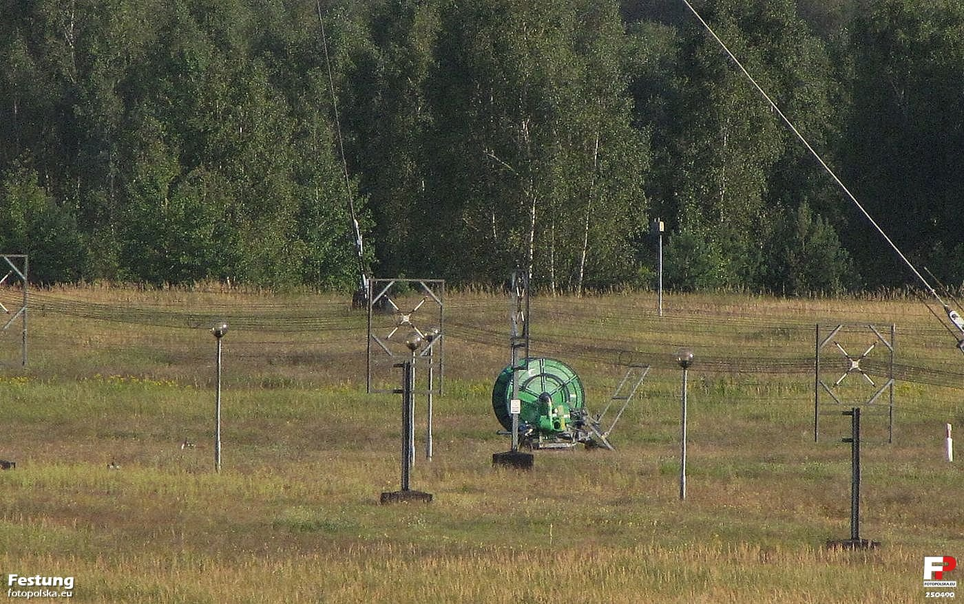 Maksymalny zoom na fider, czyli przewód antenowy otwartej konstrukcji, którym przesyłany jest sygnał z nadajnika (a właściwie nadajników, bo są trzy – ich moc jest sumowana) do anteny.